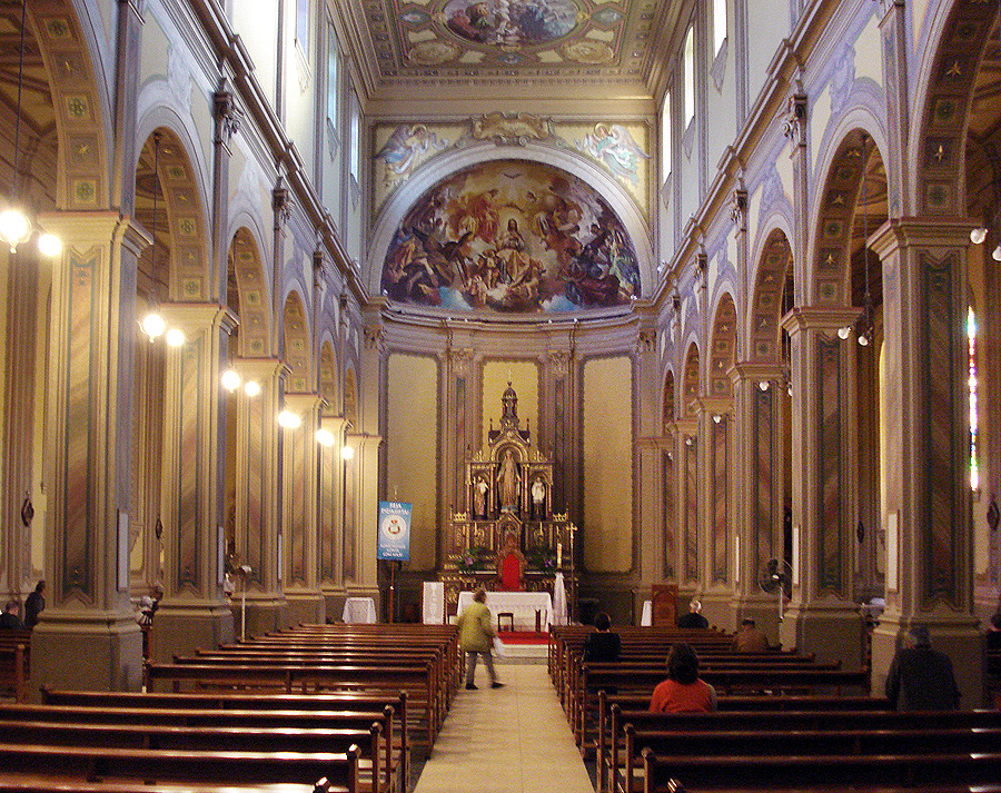 Catedral de Santa Maria, Brasil. Obras de Aldo Locatelli nas paredes e teto.